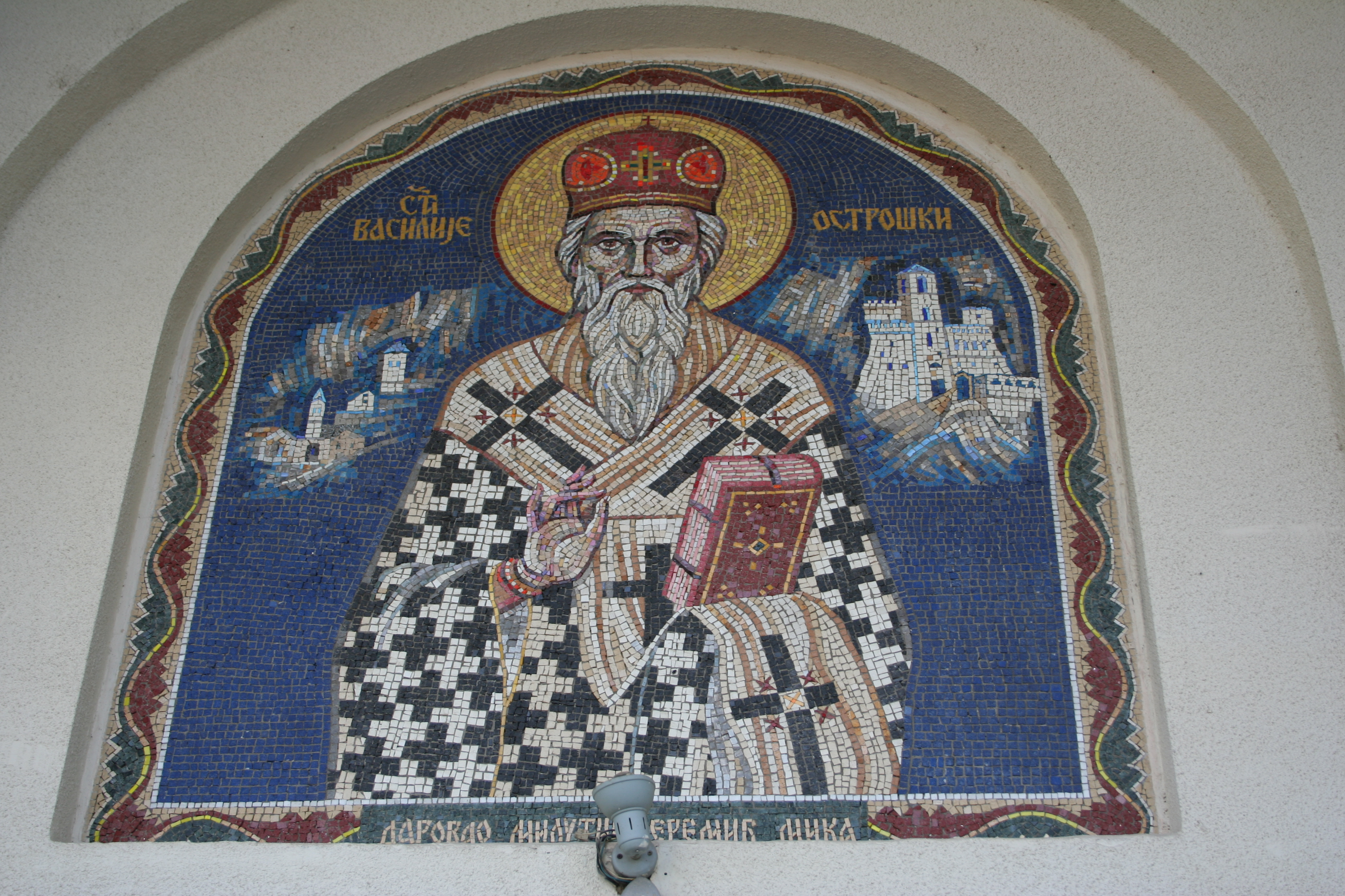 Crkva Svetog Vasilija Ostroškog u Kasarskim livadama